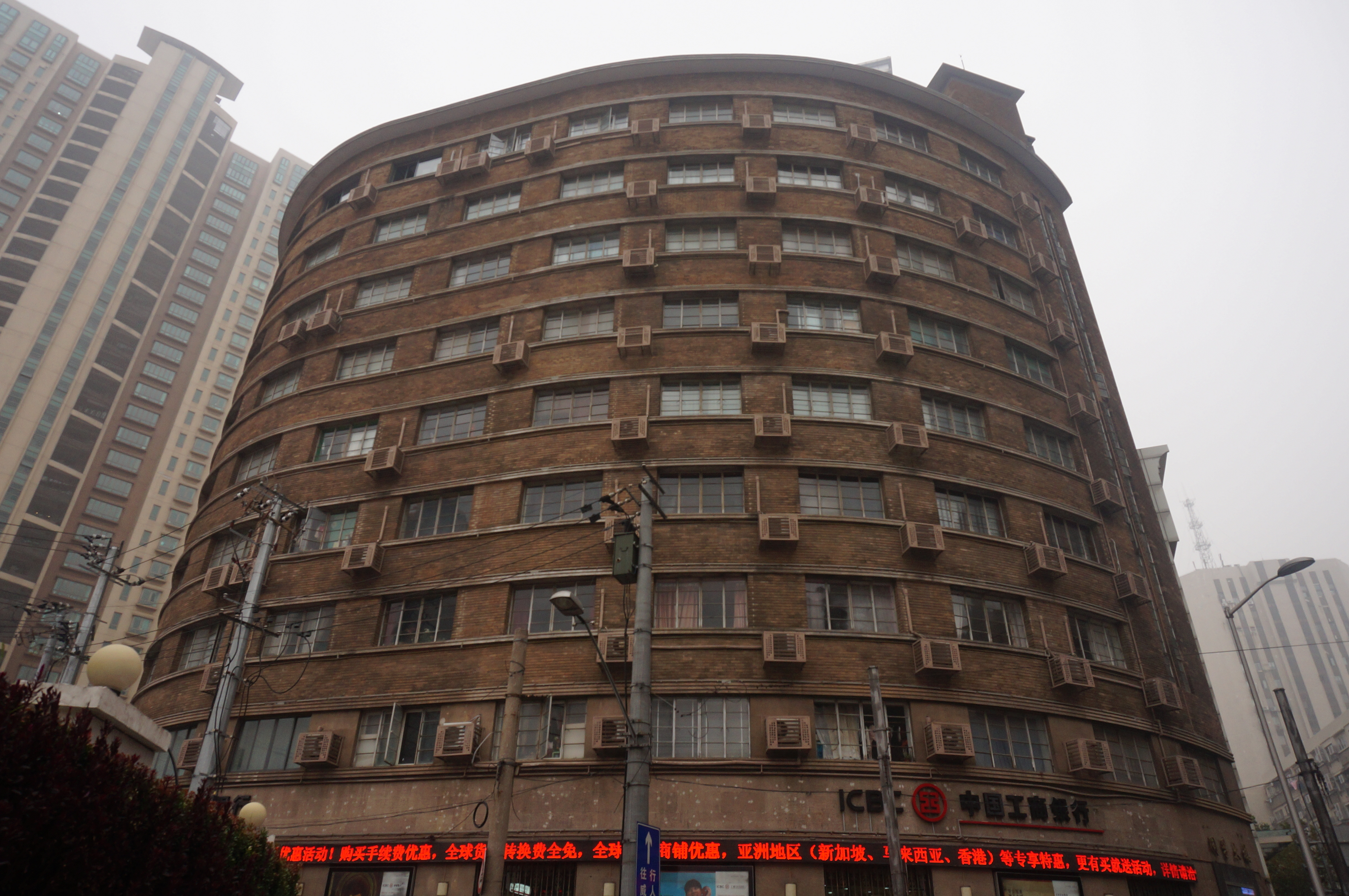 上海静安区的同孚大楼